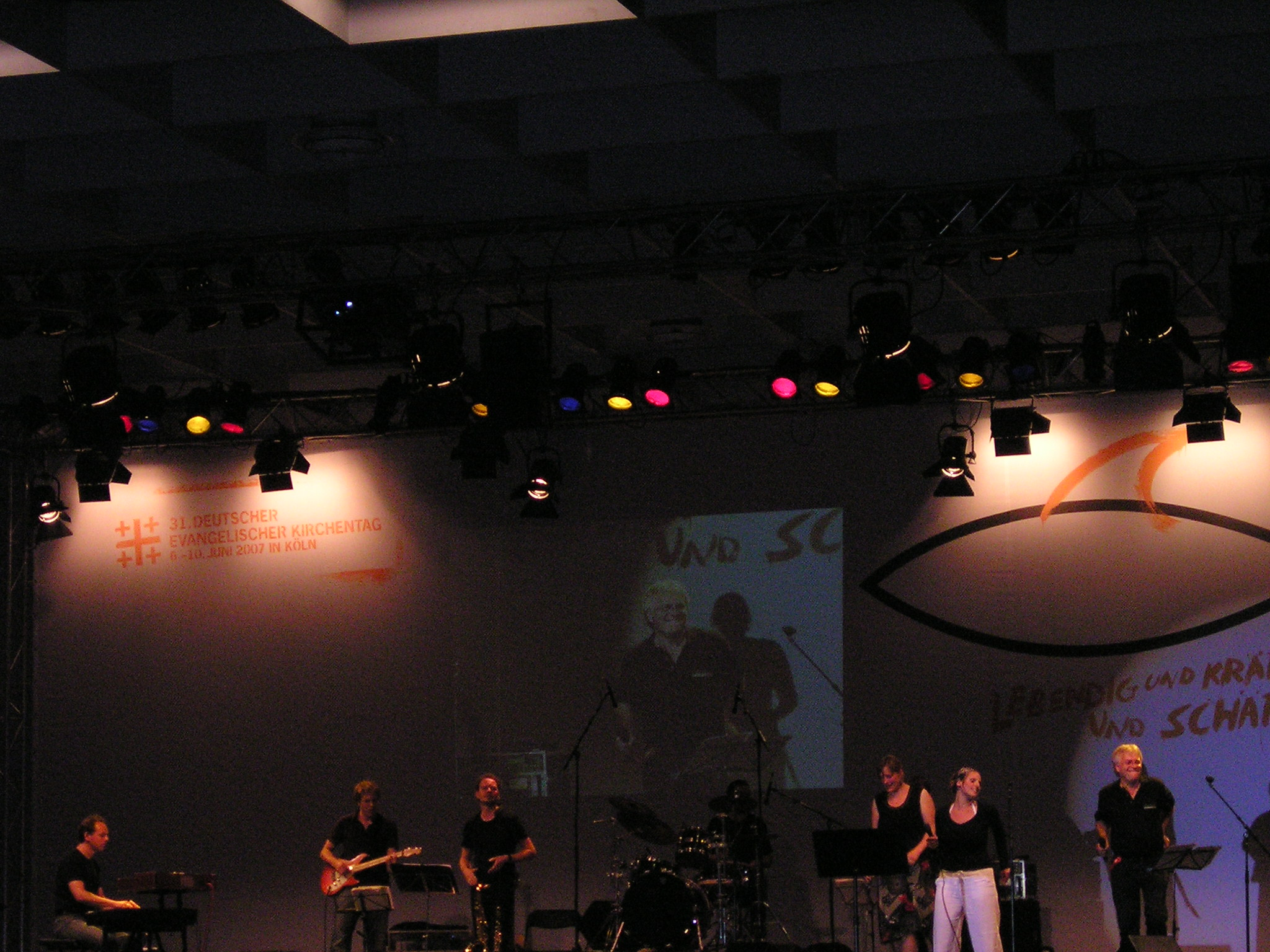 Die Band Habakuk (Band) auf dem Deutschen Evangelischen Kirchentag 2007, Konzert in der Messe Deutz, am Samstag, dem 09.06.2007, von links nach rechts Andreas Neuwirth (Piano), Jan Koslowski (Gitarre), Raphael Wolf (Saxophon), Christoph Maurer (Schlagzeug), Esther Fischer (Gesang), Laura Dörnbach (Gesang) und ganz außen rechts, der Mitbegründer der Band, Pfarrer Eugen Eckert.